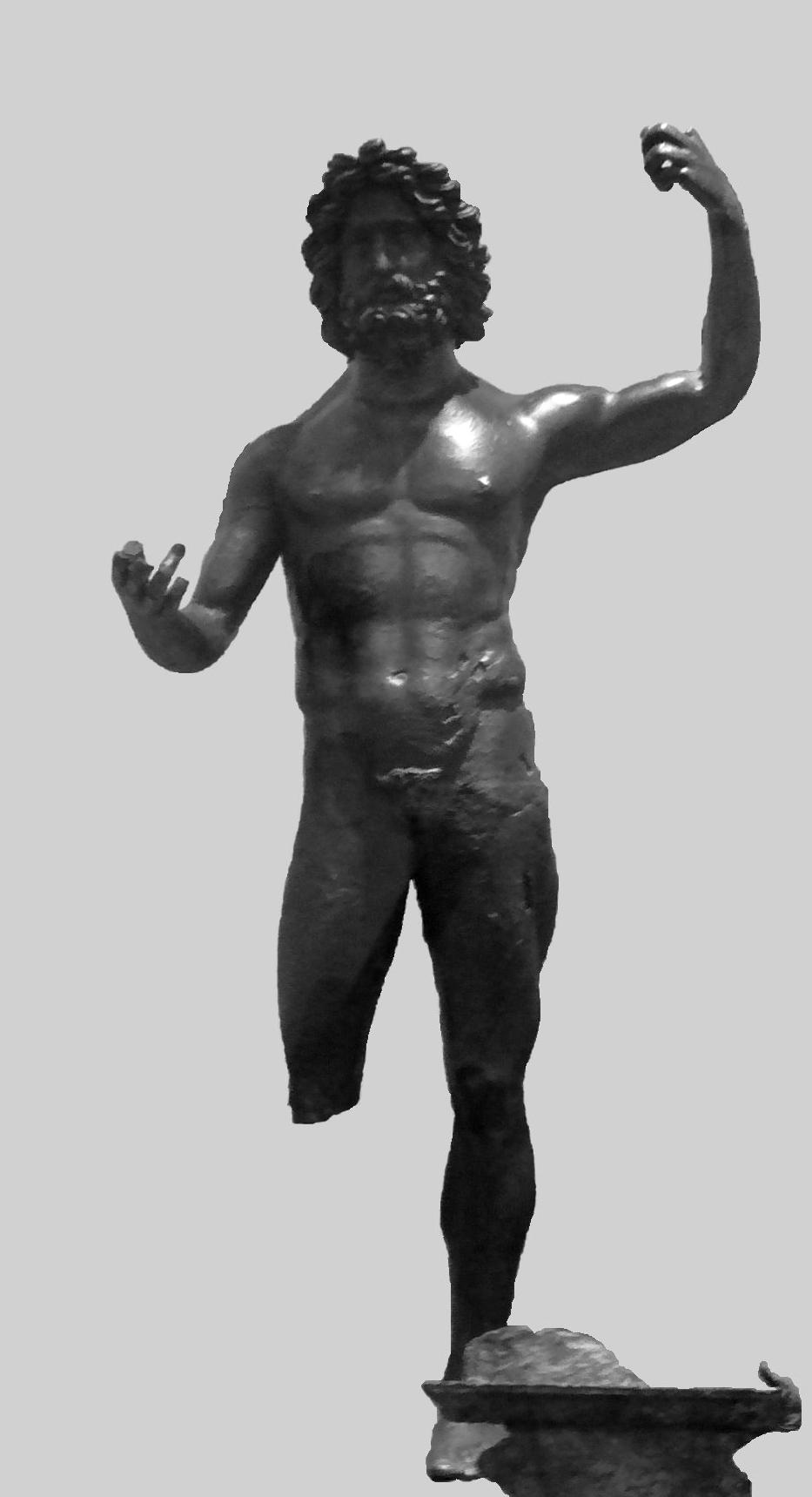 Une statue en bronze de Jupiter, en provenance de la région trévire.